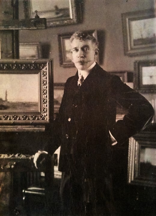 Fotografía de Enrique Swinburn Kirk, en taller, cerca de 1910; nació en Santiago de Chile, el 2 de octubre de 1859, y falleció en la misma ciudad el 22 de octubre de 1929. Fue un destacado pintor, dibujante y cronista chileno.